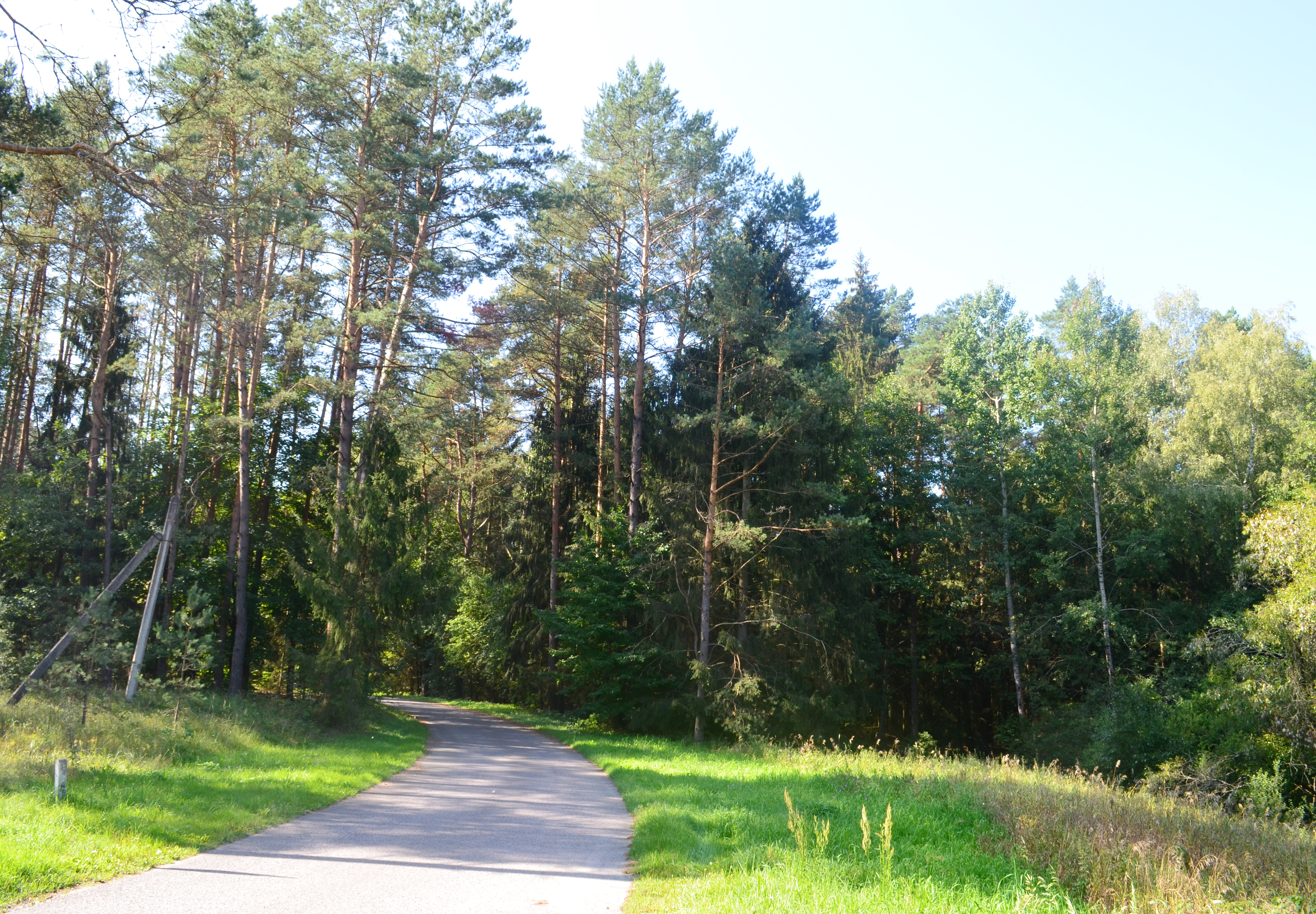 Petešos miškai ties Kelmyte, Vilniaus raj.